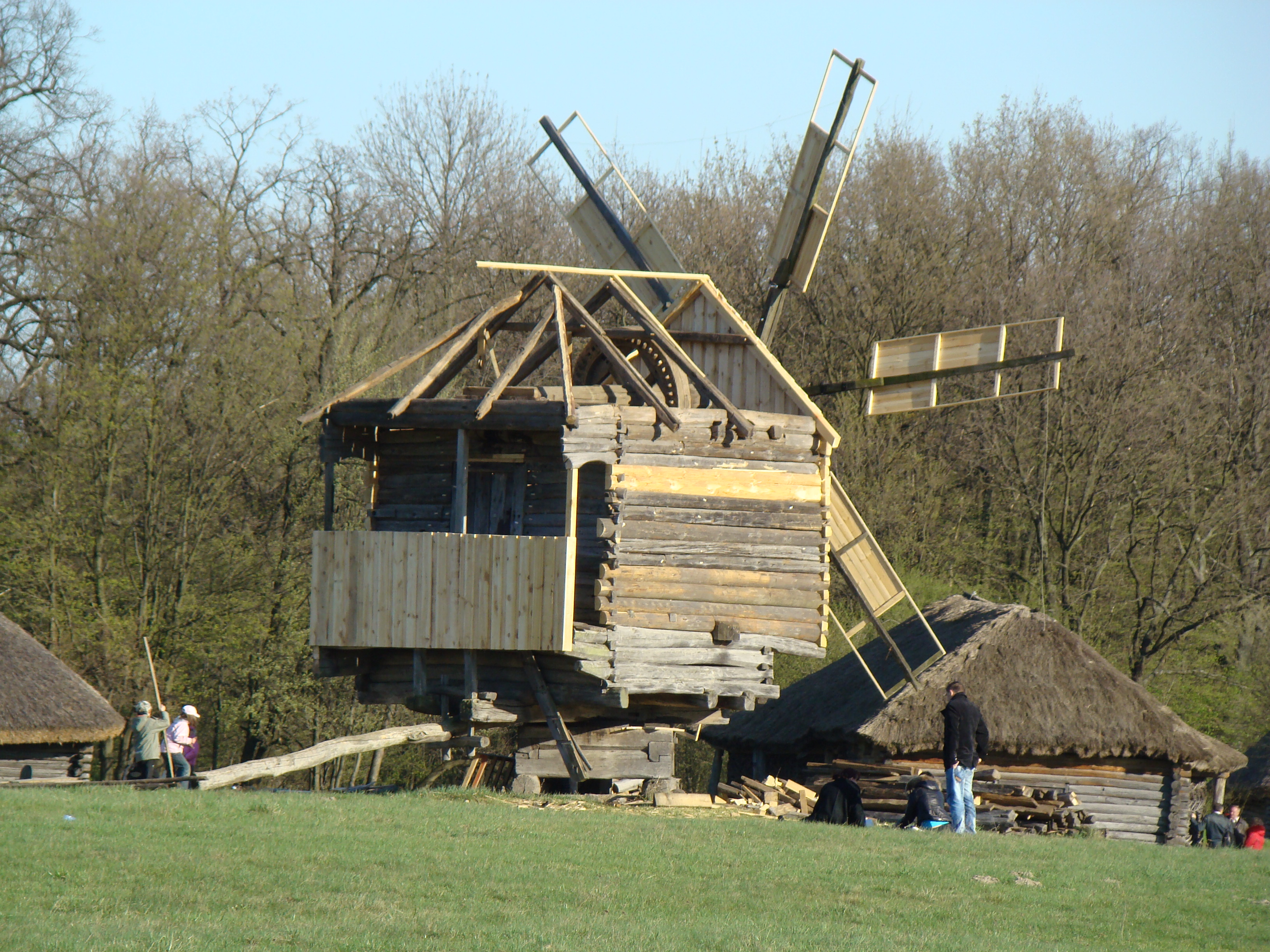 Вітряк із села Лісове Ніжинського району Чернігівської області, Київ, Пирогів